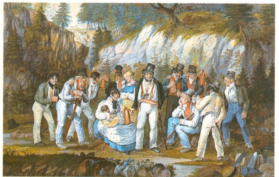 gouachemedium QS:P186,Q204330 Privatbesitz